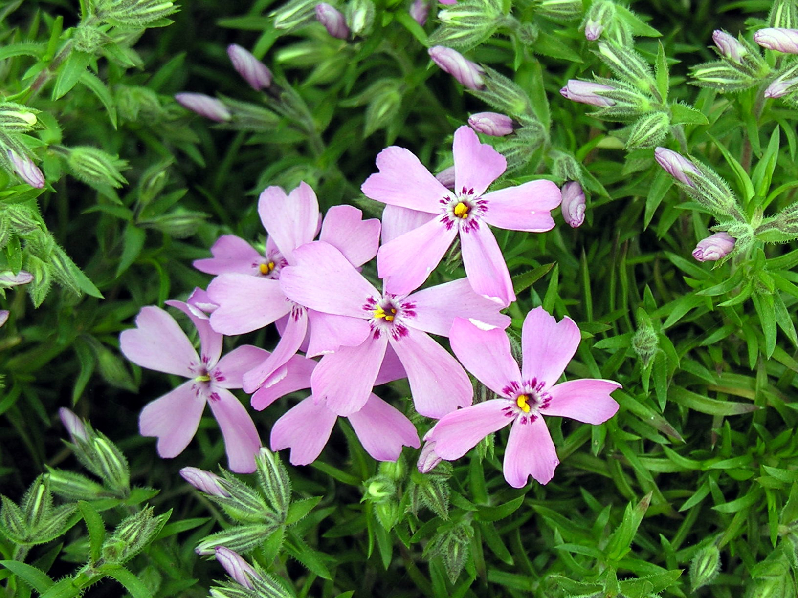 Phlox subulata Fotografavo: Algirdas, 2006 m. gegužės 10 d., Lietuva